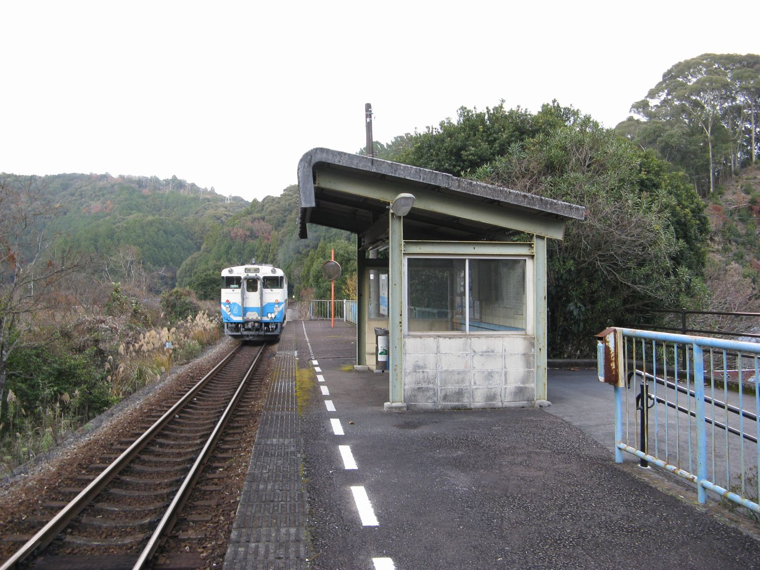 牟岐線浅川駅 ホーム